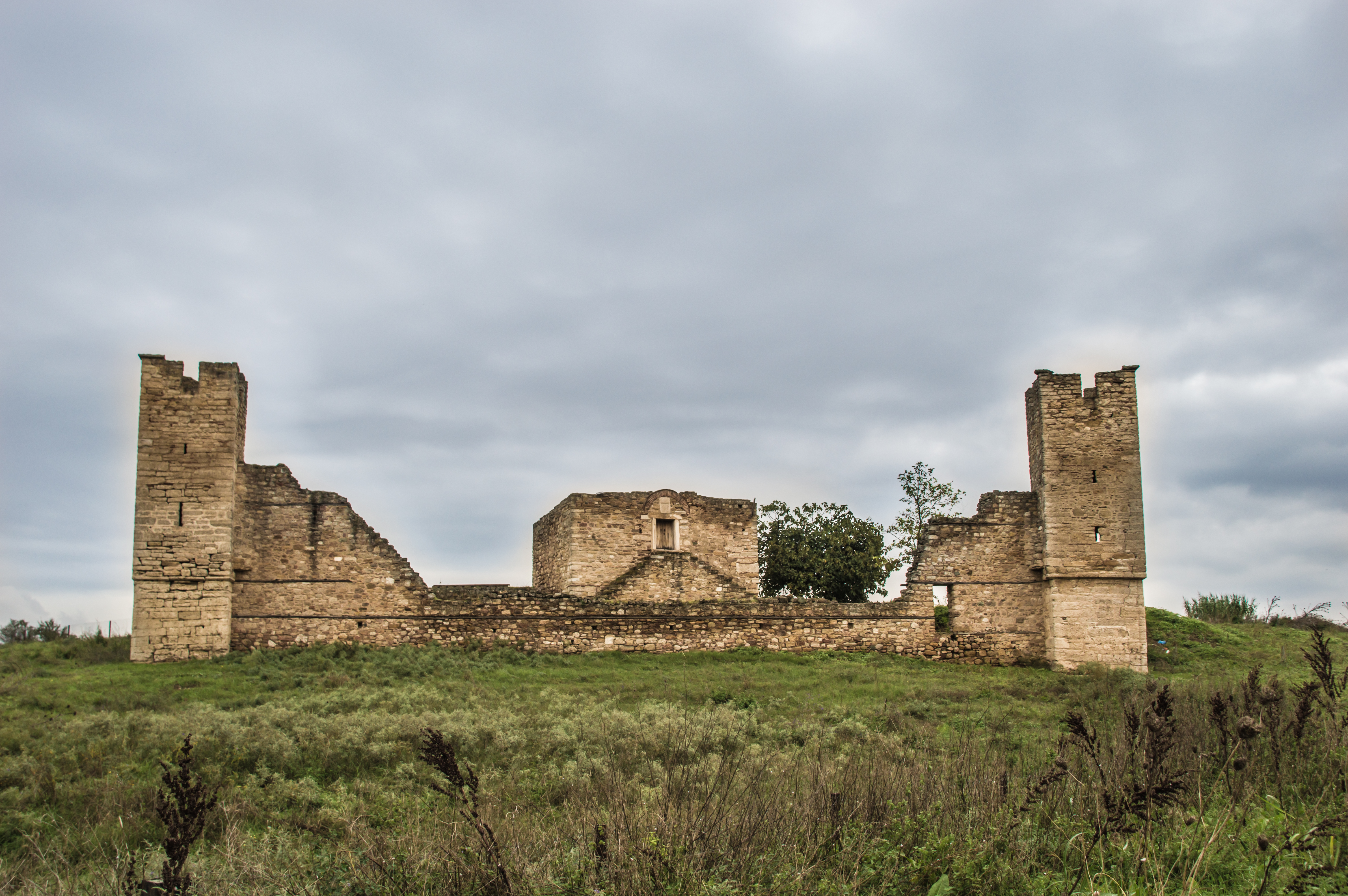 Μετόχι Κριτζιανών«Μετόχι Κριτζιανών»